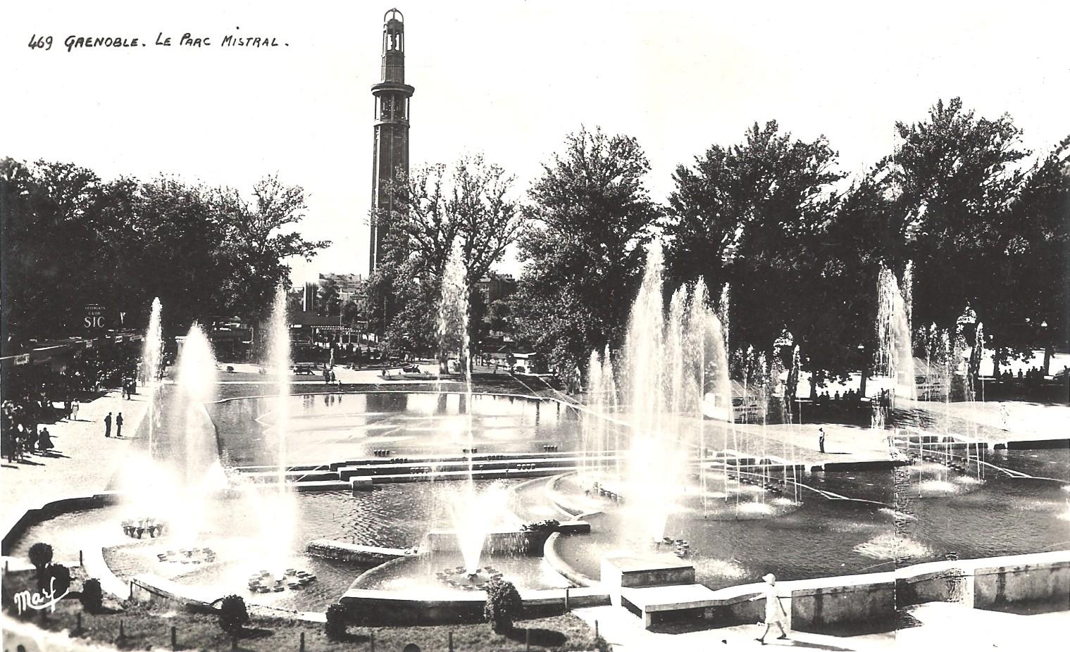 Fontaines pour l'exposition internationale de la houille blanche de 1925 dans le parc de l'exposition à Grenoble (futur parc Paul Mistral).